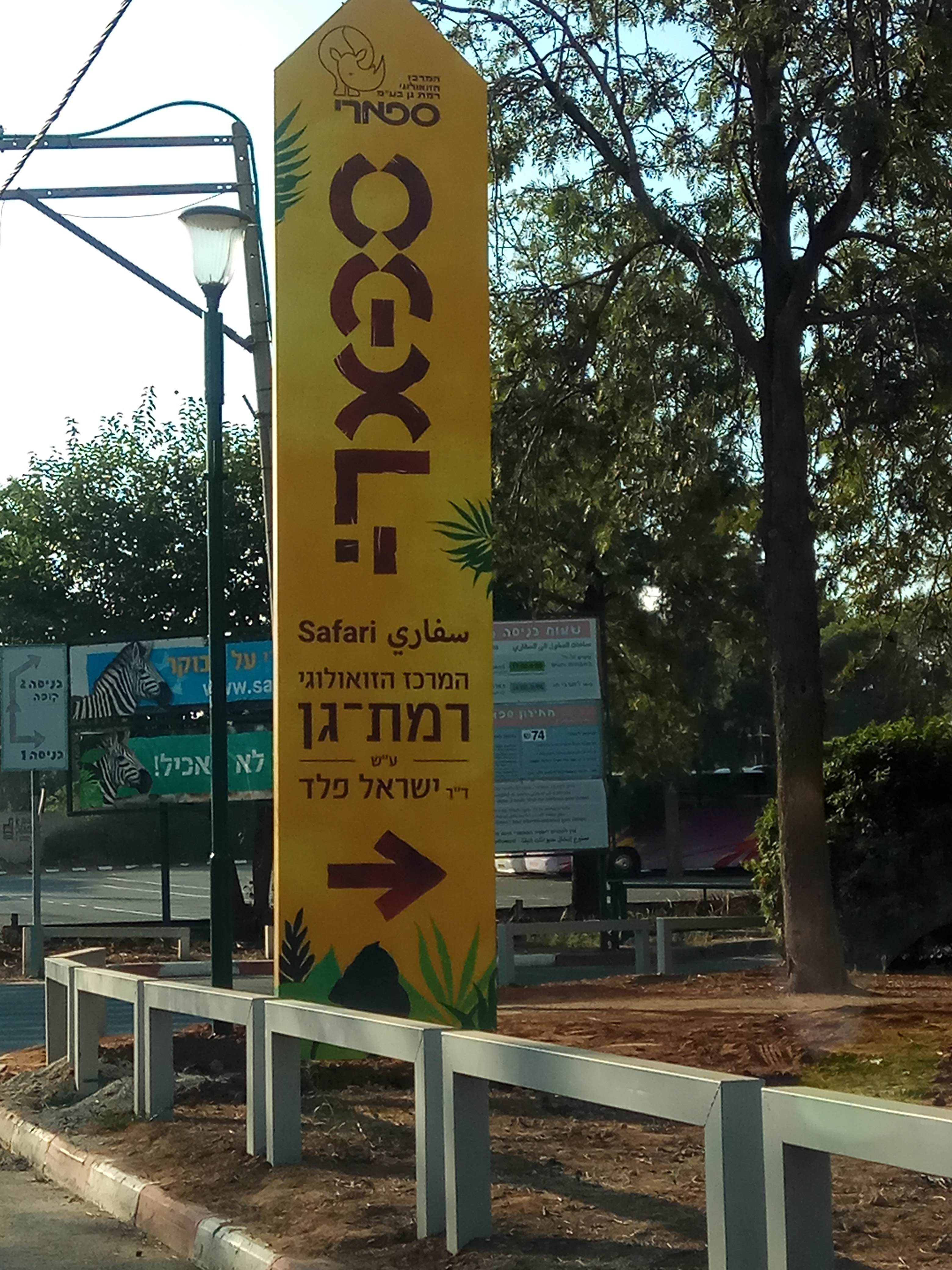 הספארי ברמת גן על שם ד"ר ישראל פלד